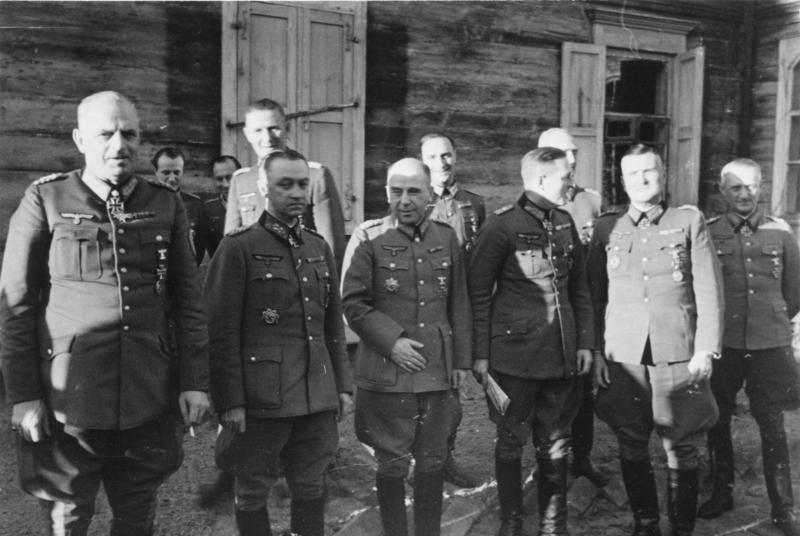 Information added by Wikimedia users.Rußland.- Generäle vor Holzhaus, v.l.n.r. Generalfeldmarschall Ernst Busch, Generale Walter-Otto Weiss, Hans Krebs, Friedrich Hoßbach, Rudolf v. Roman, Hans Speth